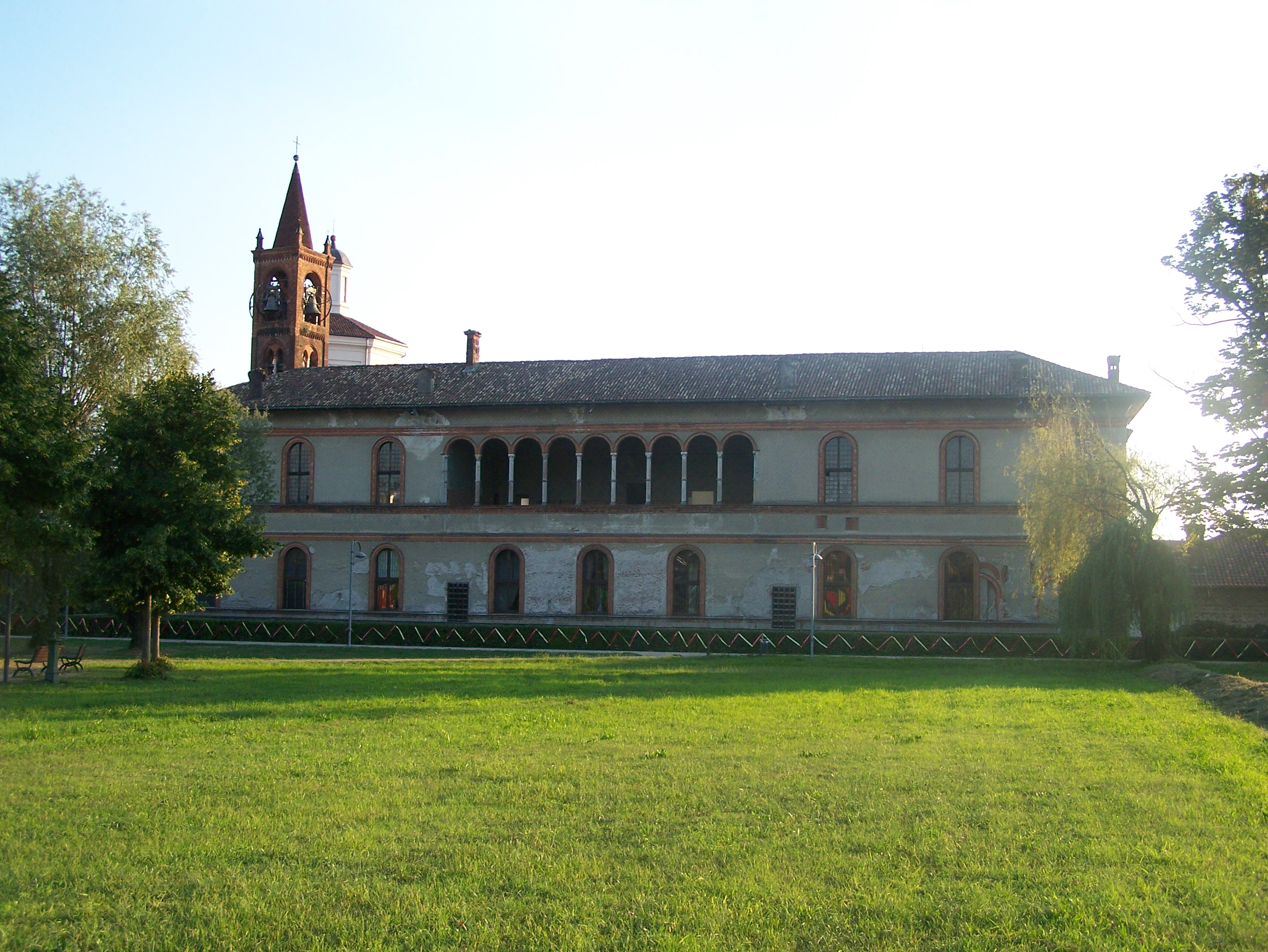 Palazzo Visconti a Bernate Ticino (MI) - Italy